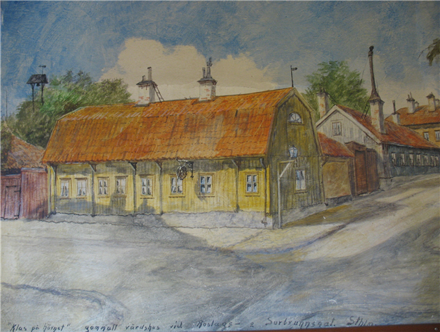 Fresk av Einar Hillberg föreställande Klas på hörnet, ett gammalt värdshus vid Roslagsgatan-Surbrunnsgatan i Stockholm. En av de fresker som Einar Hillberg målade i sin sons, Ove Hillbergs, nybyggda hus i Eskiltuna 1953.